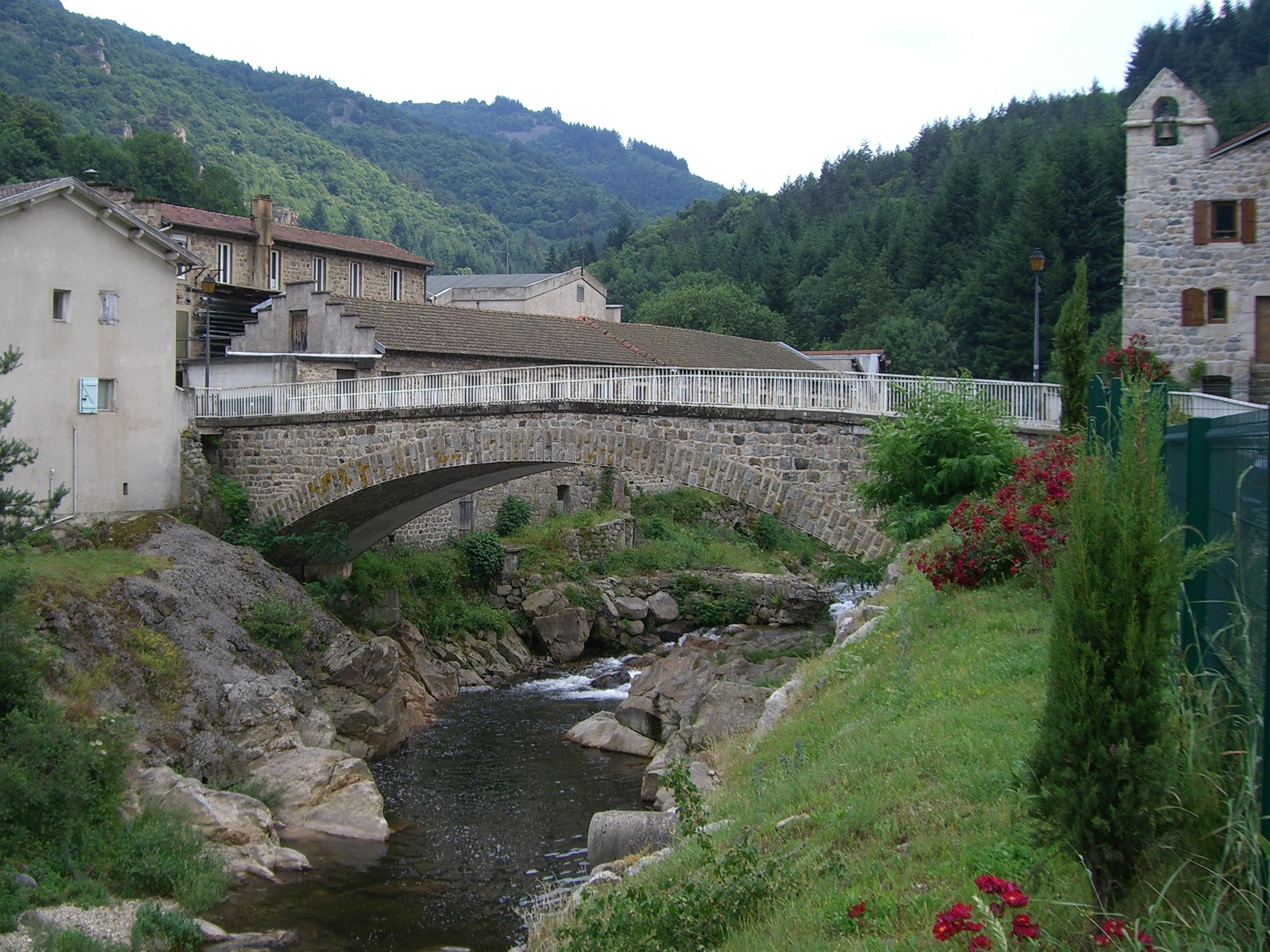 Il s'agit du pont de fromentières qui a donné son nom au lieu-dit le Pont-de-Fromentières. Ce lieu-dit est rattachés à la commune Mariac.